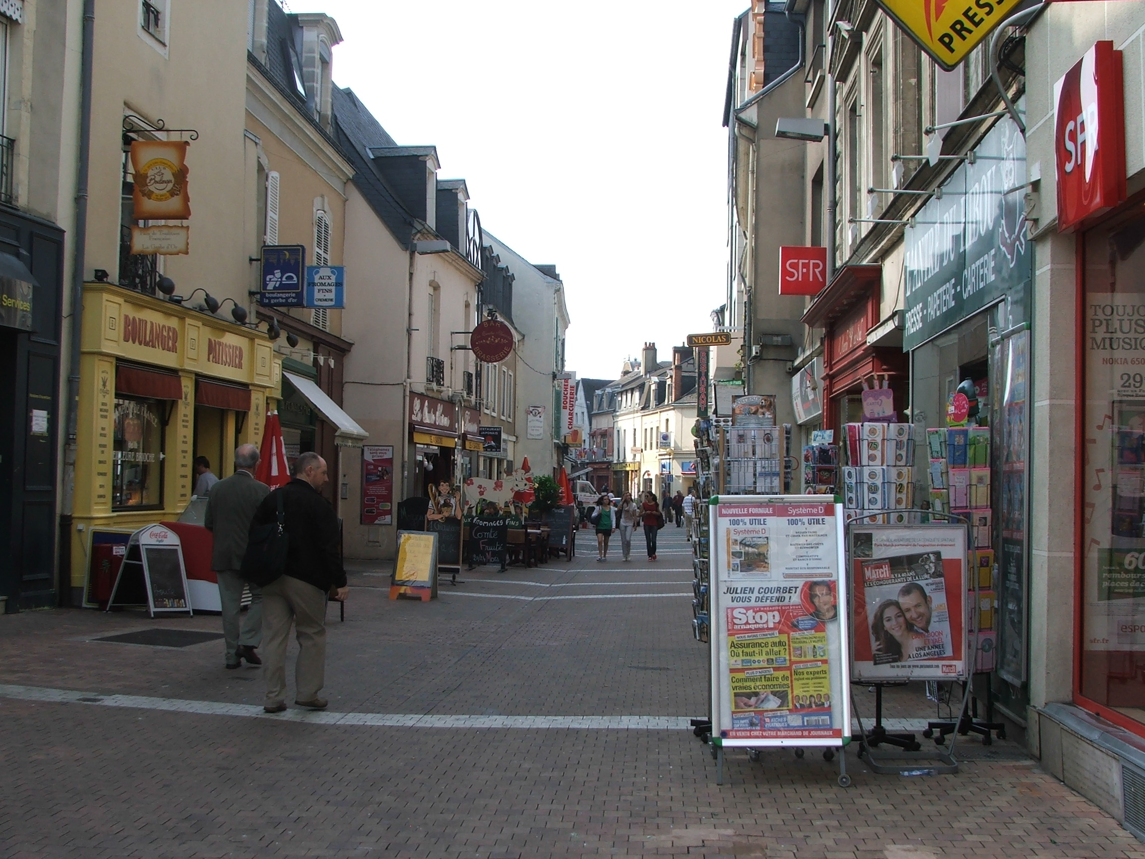 La rue du docteur Leroy au Mans.